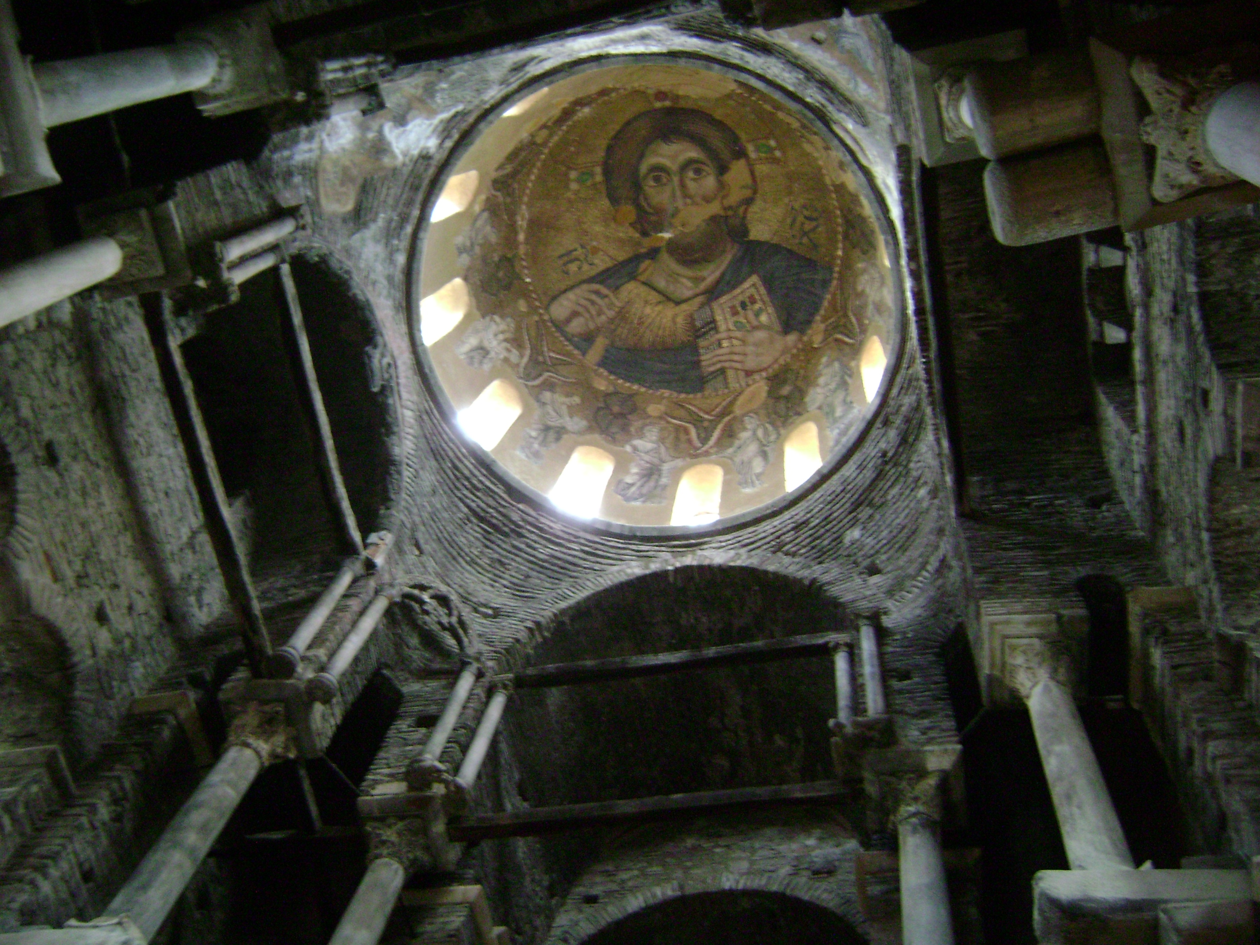 Άρτα, Παρηγορήτισσα, κεντρικός τρούλος